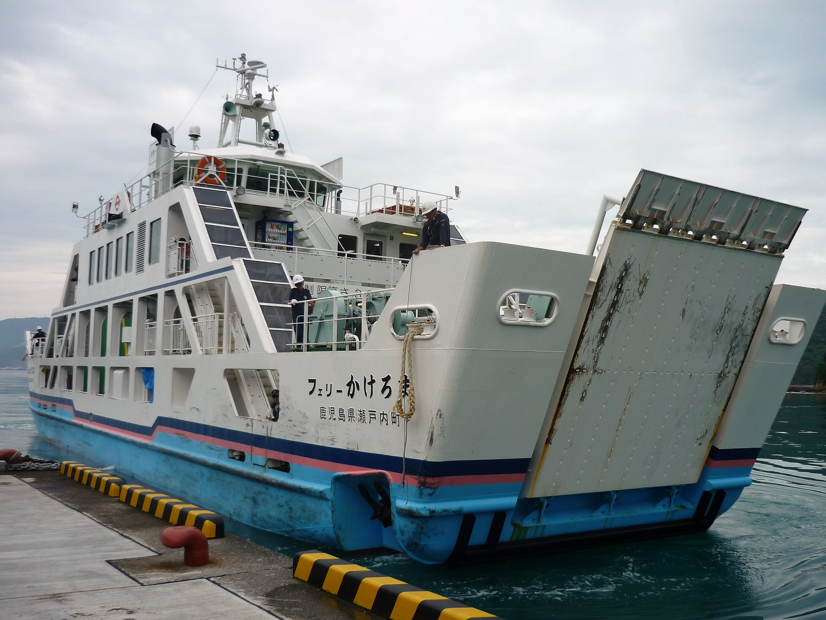 生間港に到着したフェリーかけろま